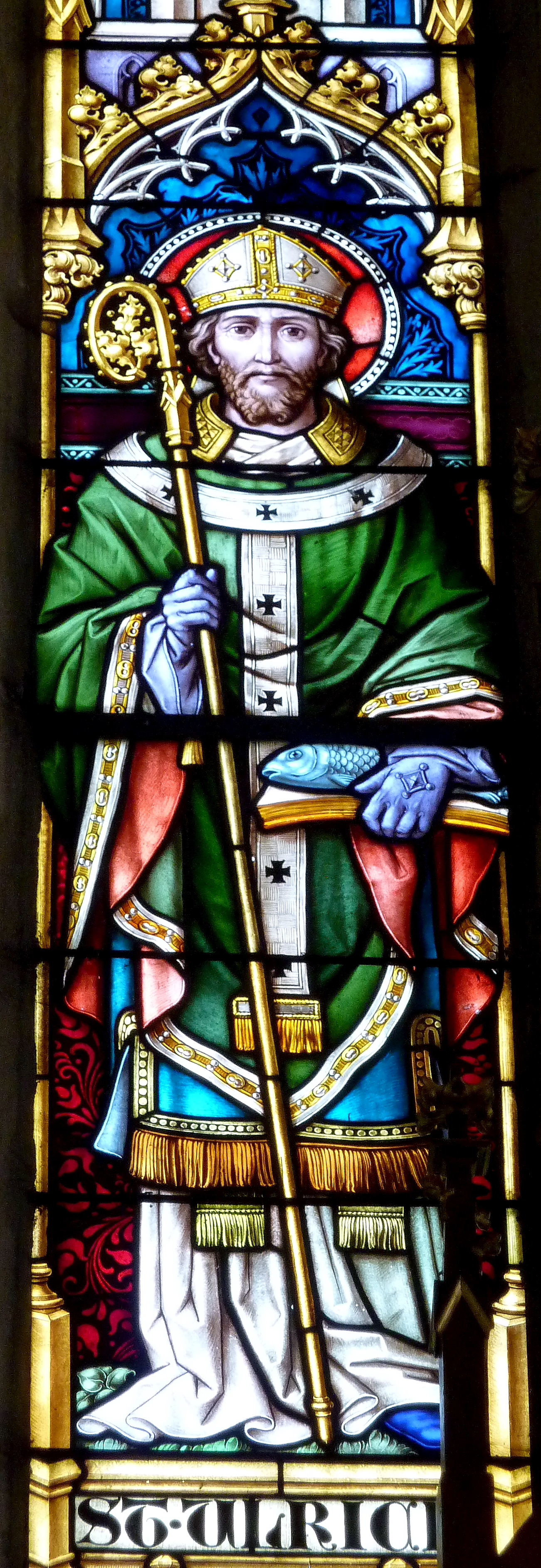 Katholische Pfarrkirche St. Martin in Staufen (Gemeinde Syrgenstein) im Landkreis Dillingen an der Donau, linke Lanzette des mittleren Chorfensters mit der Darstellung des hl. Ulrich, der ein Buch in der Hand hält, auf dem ein Fisch liegt